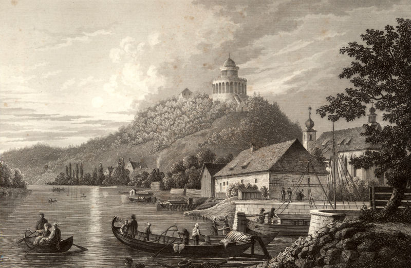 Die Kanal-Ausmündung in die Donau bei Kehlheim [sic!] mit der Befreiungshalle. Stahlstich von Alexander Marx aus dem Buch Pittoreske Ansichten des Ludwig-Donau-Main-Kanals. Gezeichnet, auf Stahl gestochen und herausgegeben von Alexander Marx. 1845. Kupferstecher in Nürnberg. Das Bild zeigt noch den Originalentwurf der 1863 fertiggestellten Befreiungshalle von Friedrich von Gärtner.